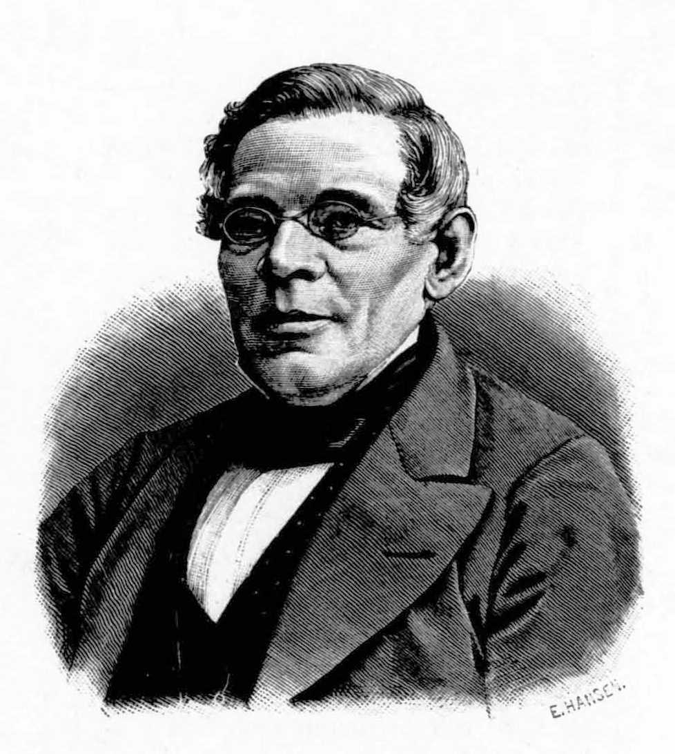 Johan Fröberg (1812-1884)